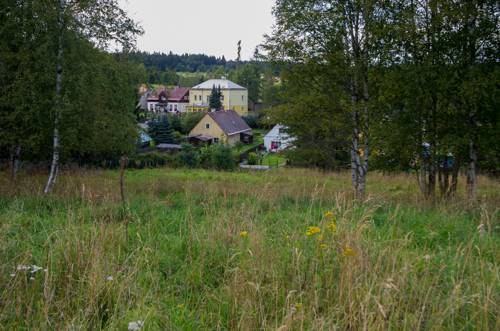 obec Prameny, okres Cheb